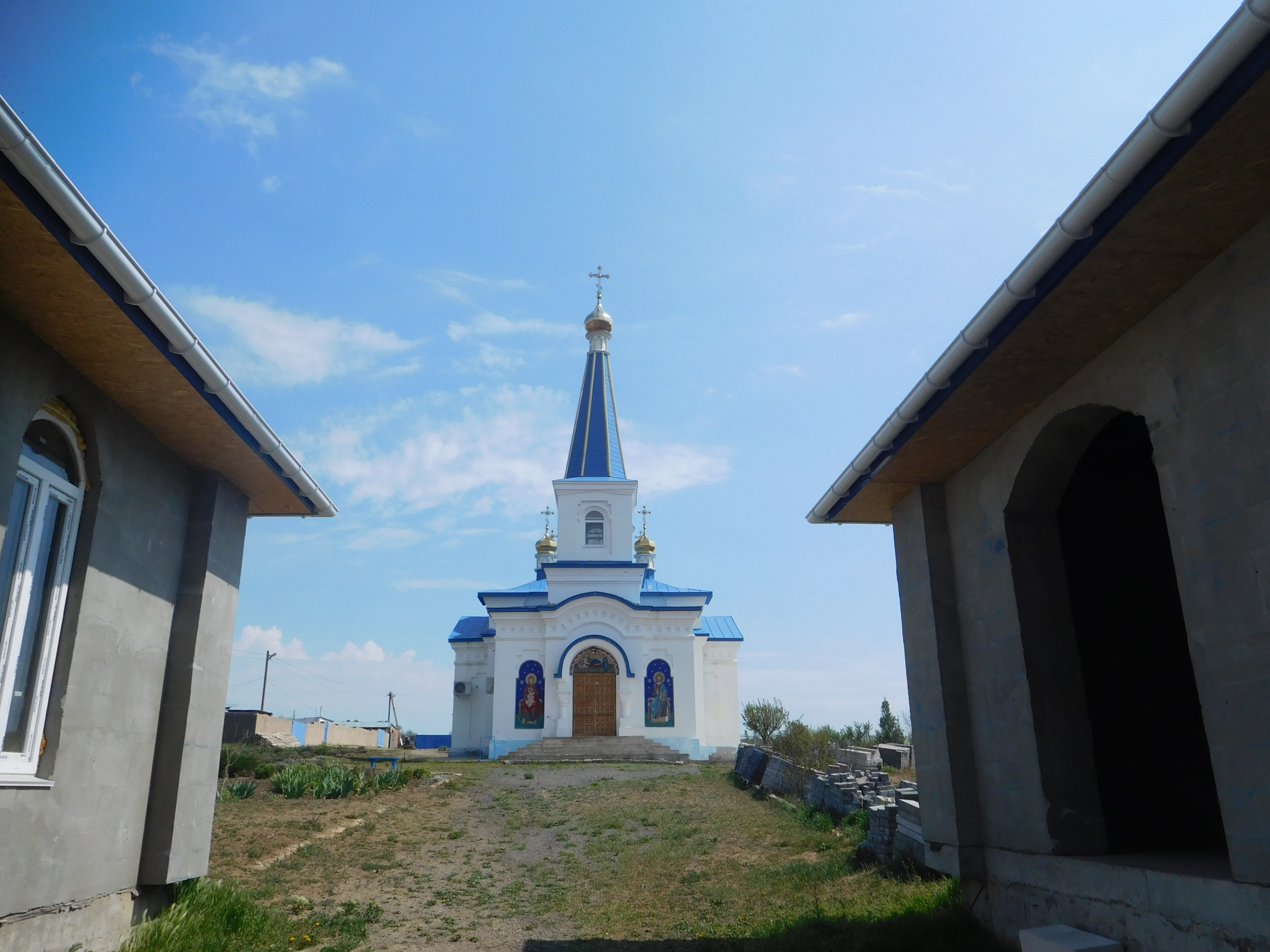 с. Баранове, Одеська область